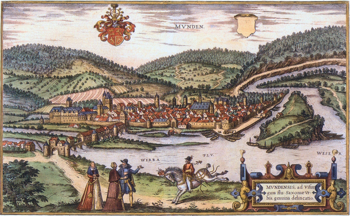 Hann. Münden 1584 Kupferstich von Frans Hogenberg